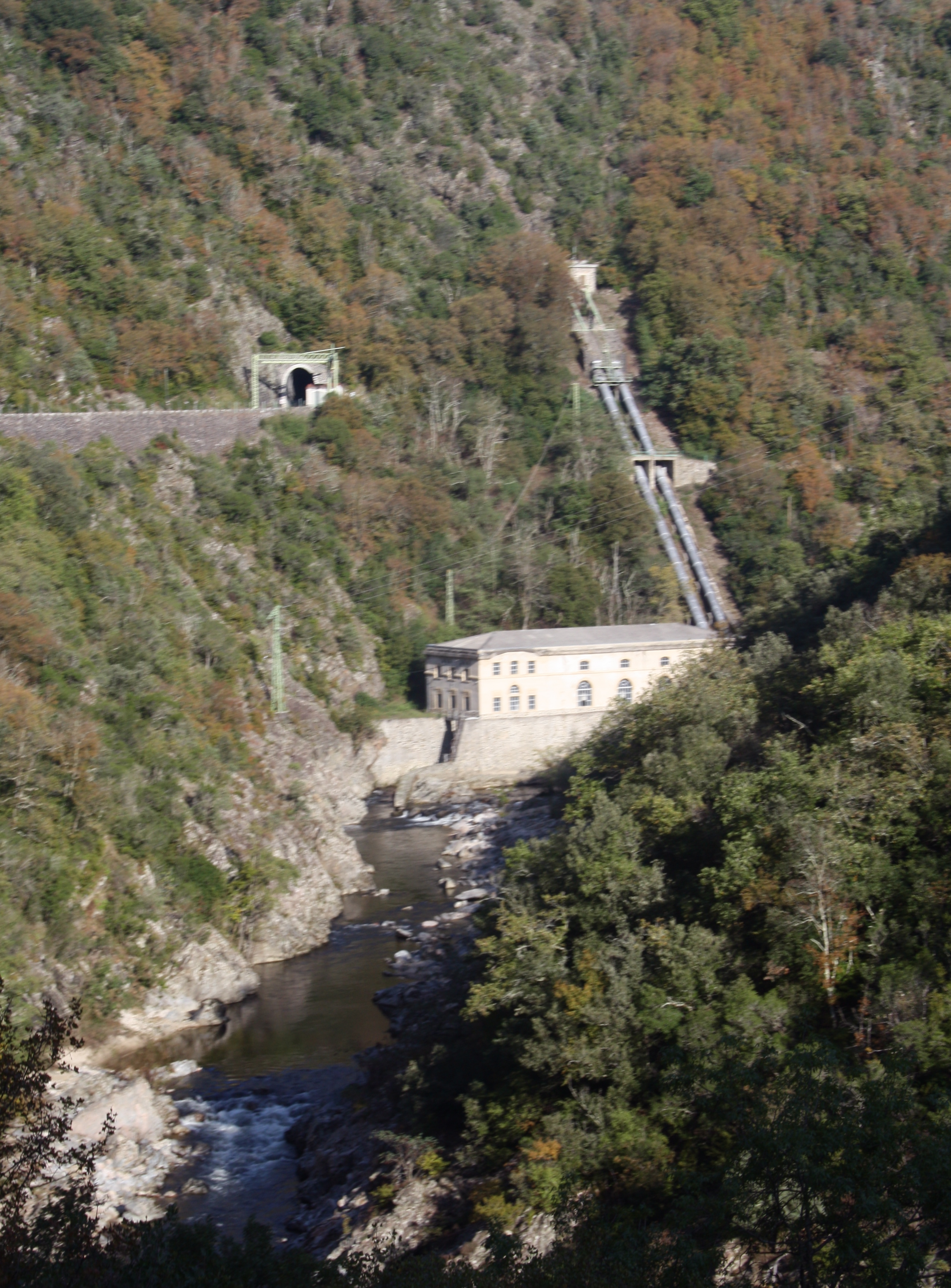 Usine hydroélectrique de Mordane sur le Doux